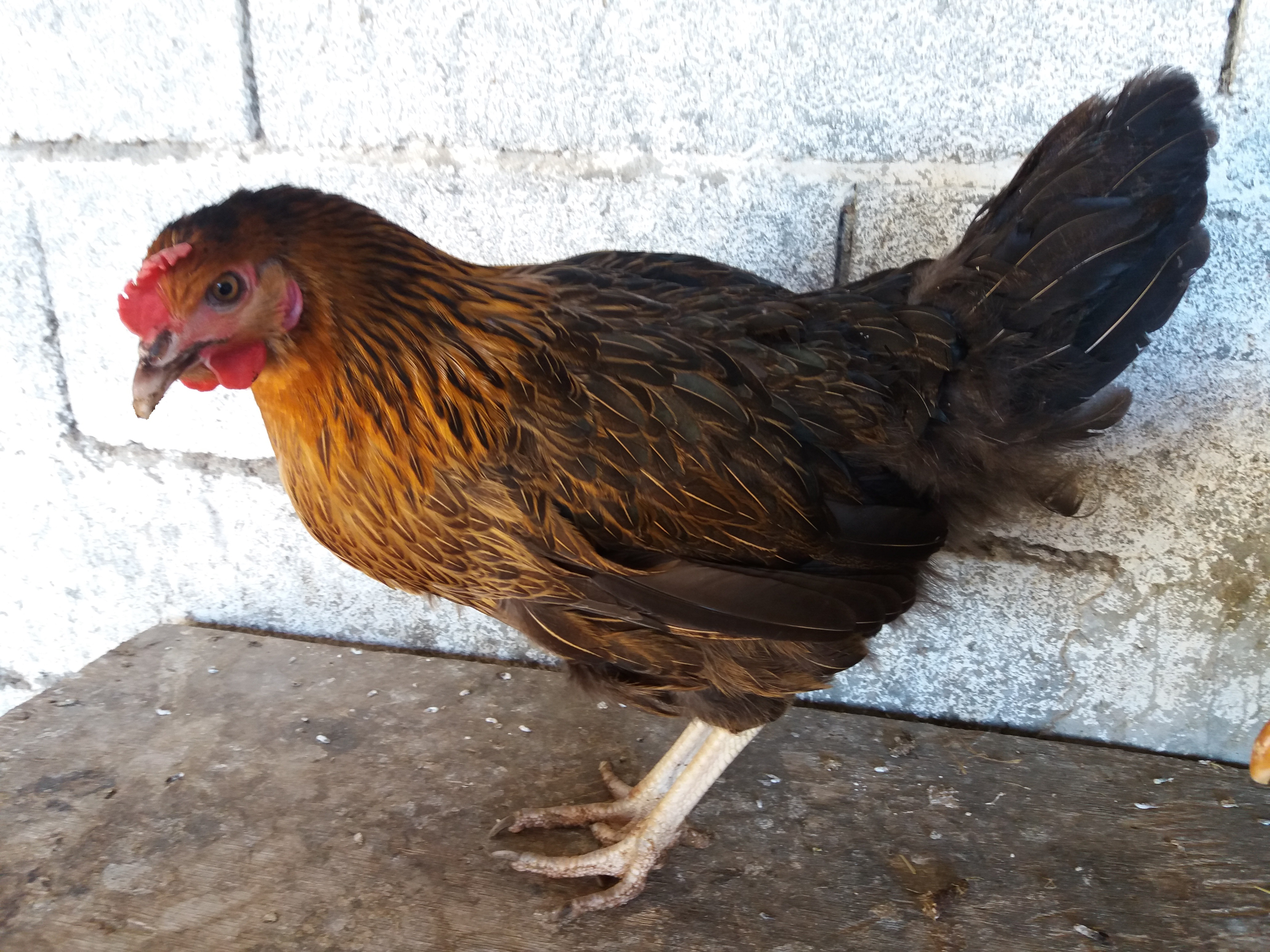 Poule Harco